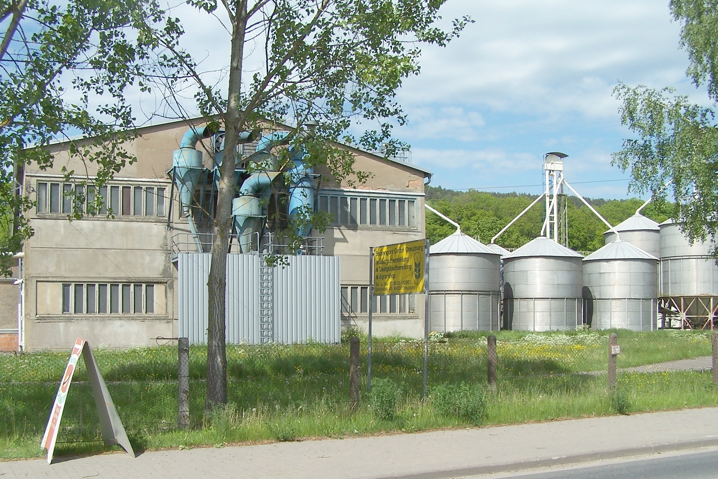 Der Getreideverarbeitungsbetrieb Saatengold Creuzburg in der Bahnhofstraße in Creuzburg wurde 1972 als Filiale des VEB Petkus Wutha gegründet, die installierte Technik wurde hier unter Praxisbedingungen optimiert.